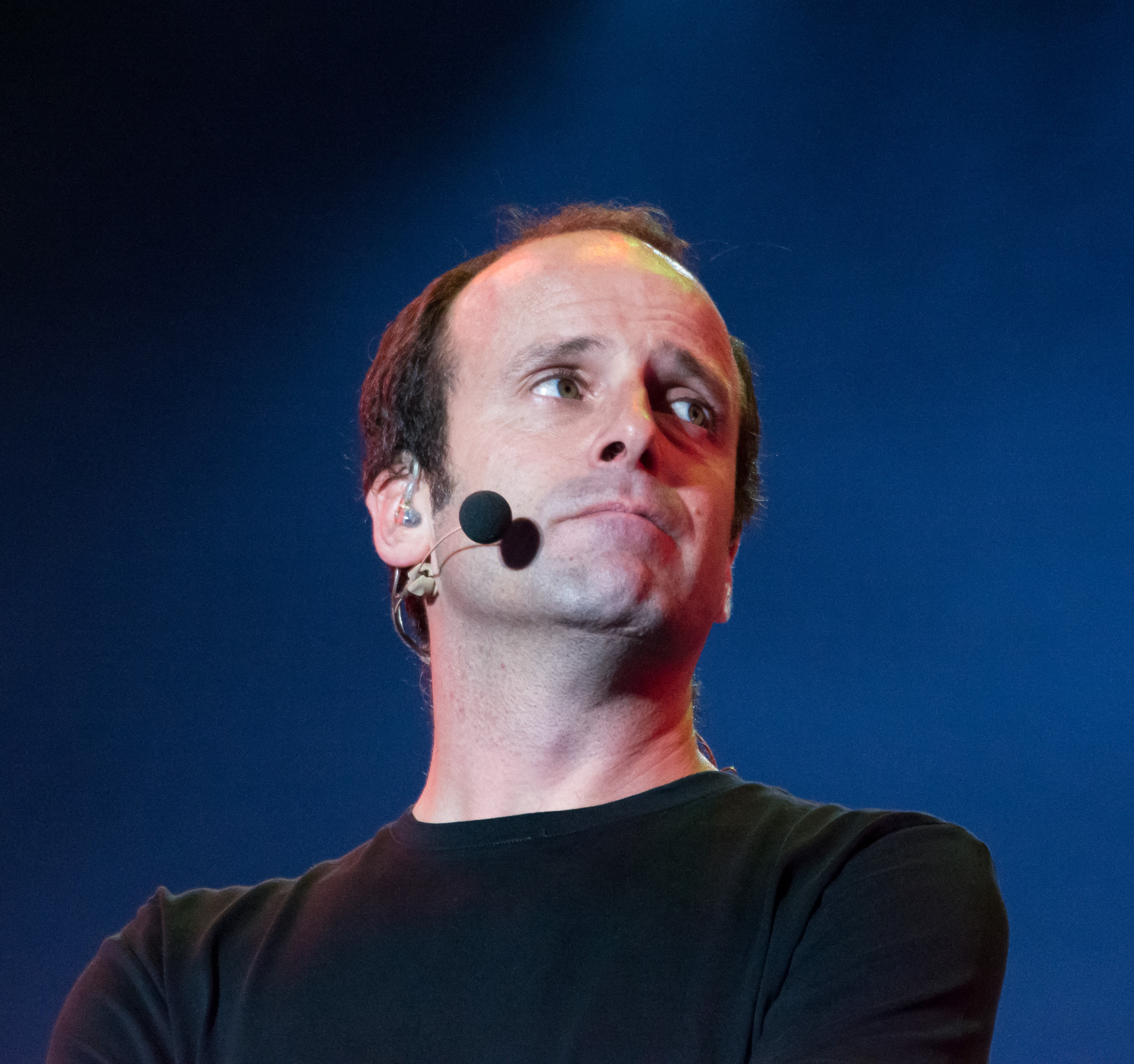 Expo Quillota 2020, Estadio Municipal Lucio Fariña Fernández, Quillota, Región de Valparaíso, Chile